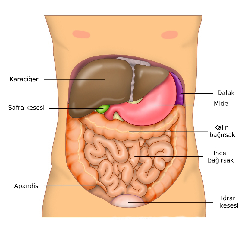 İnsan karnının anatomisi, Ties van Brussel / tiesworks.nl tarafından